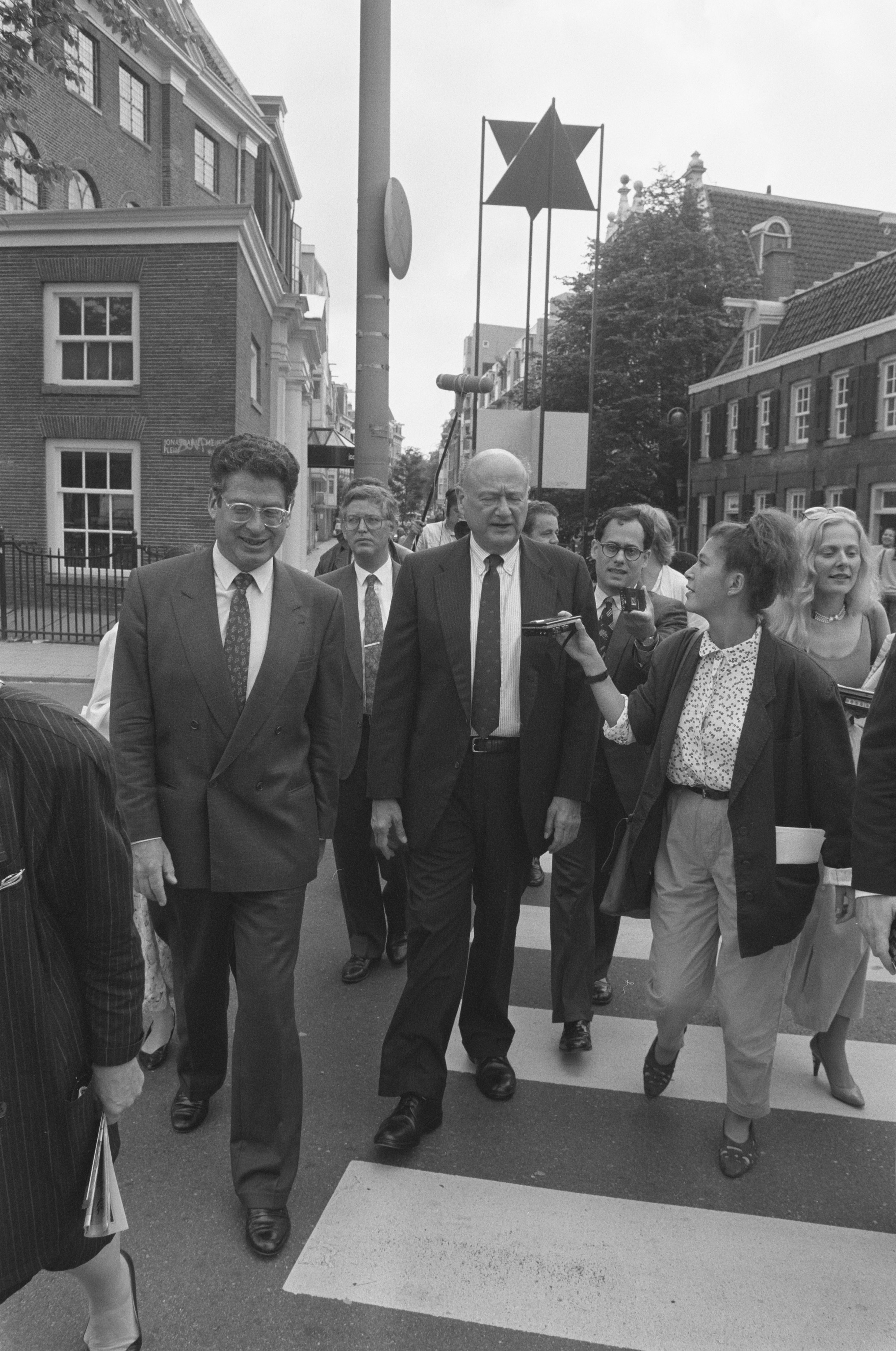 Collectie / Archief : Fotocollectie Anefo Reportage / Serie : [ onbekend ] Beschrijving : Burgemeester Edward Koch van New York bezoekt Amsterdam burgemeester Van Thijn (l) ev na bezoek aan Joods Historisch Musuem Datum : 19 juli 1988 Locatie : Amsterdam, New York Trefwoorden : BURGEMEESTERS Persoonsnaam : Edward Koch Fotograaf : Croes, Rob C. / Anefo Auteursrechthebbende : Nationaal Archief Materiaalsoort : Negatief (zwart/wit) Nummer archiefinventaris : bekijk toegang 2.24.01.05 Bestanddeelnummer : 934-2885